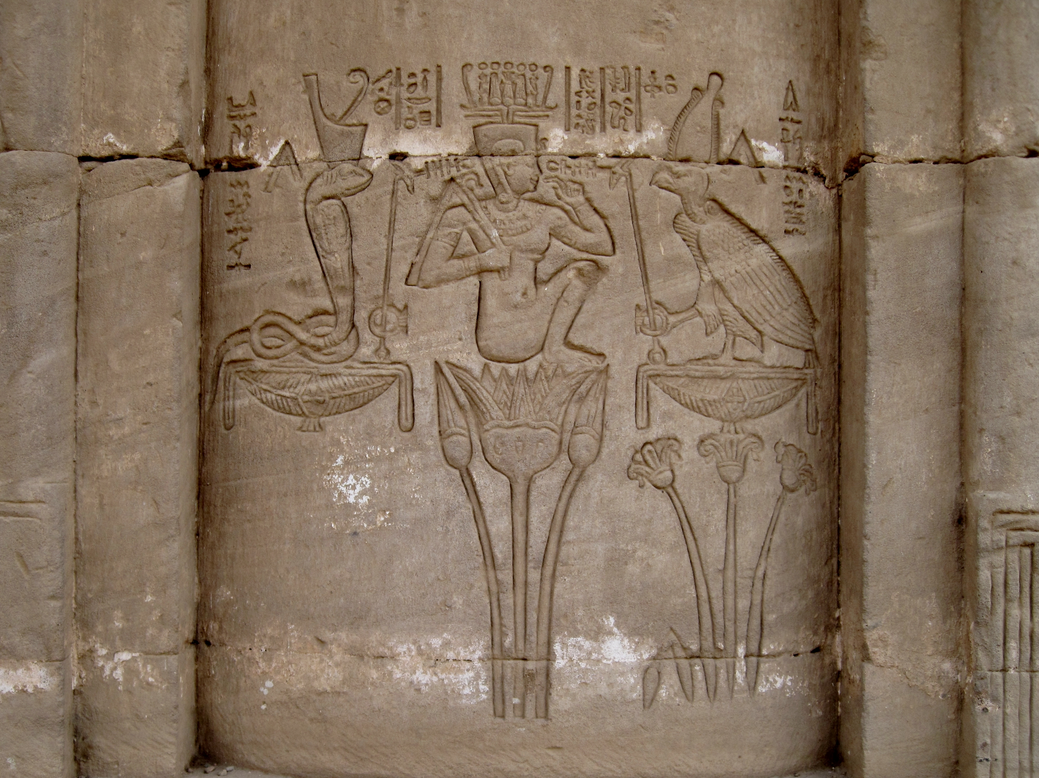 Römisches Mammisi im Tempelkomplex von Dendera, Ägypten